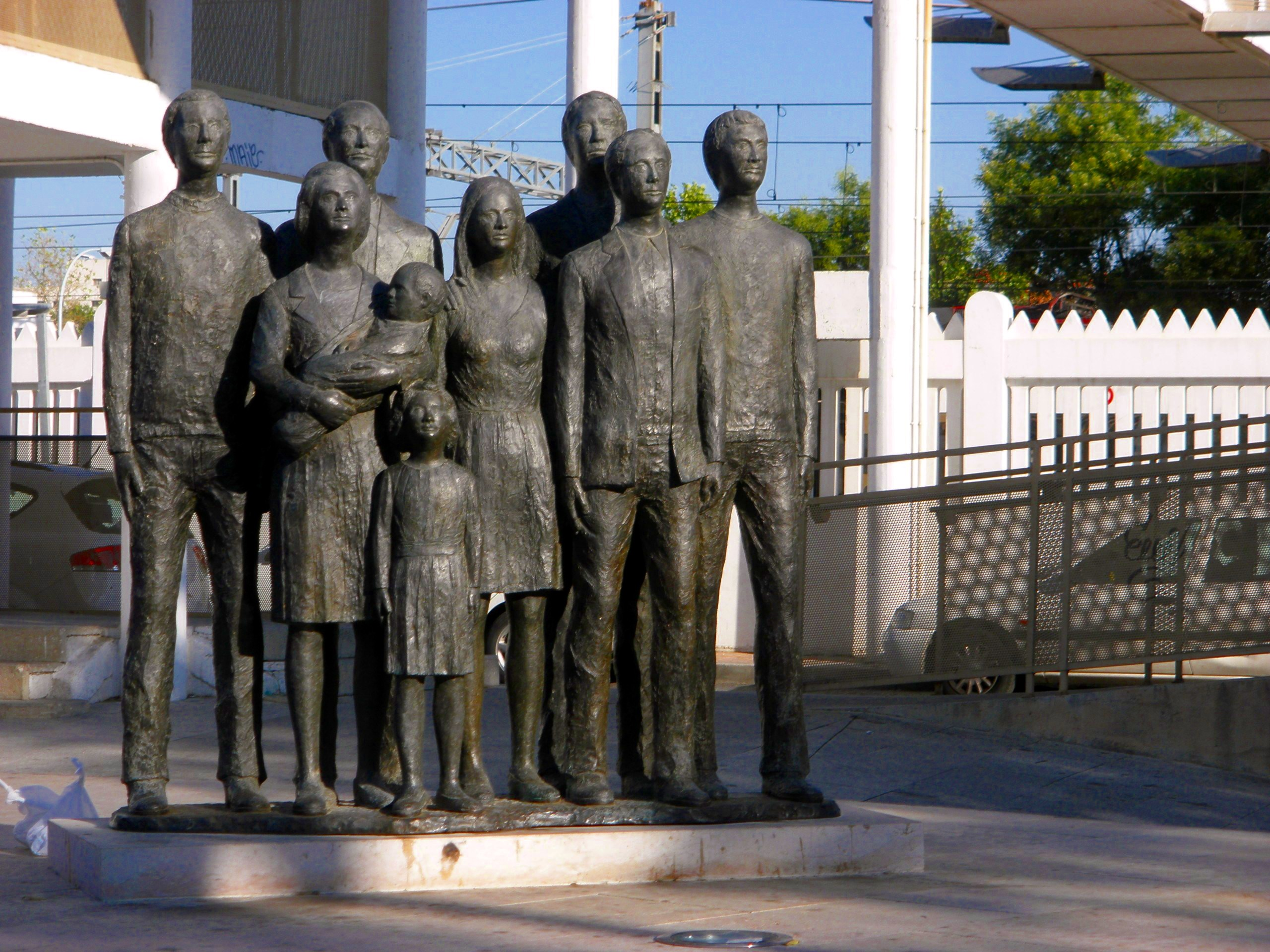 Alcalá de Henares, monumento a las victimas del 11-M, España.